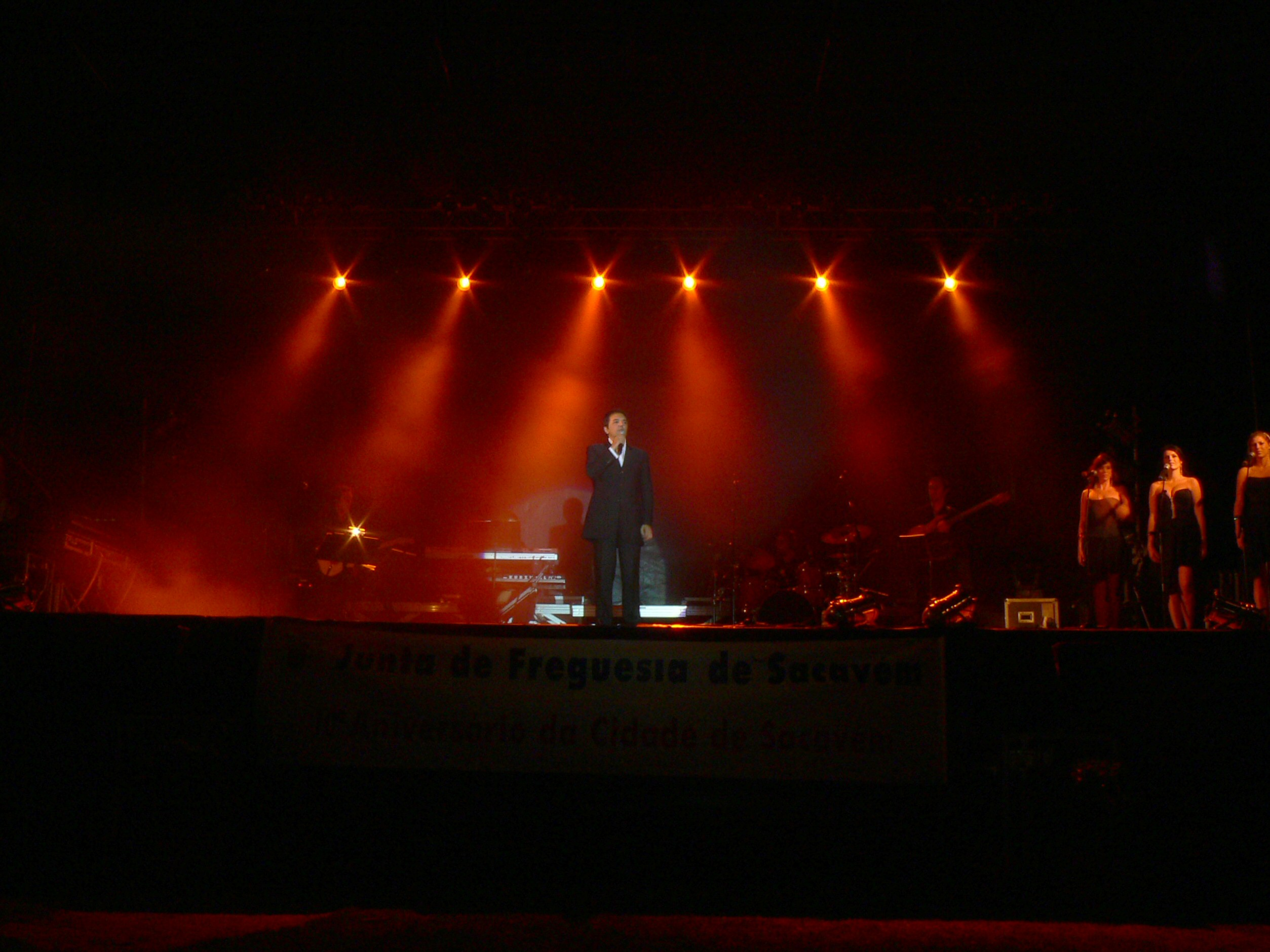 Fernando Pereira - Espectáculo em Sacavém